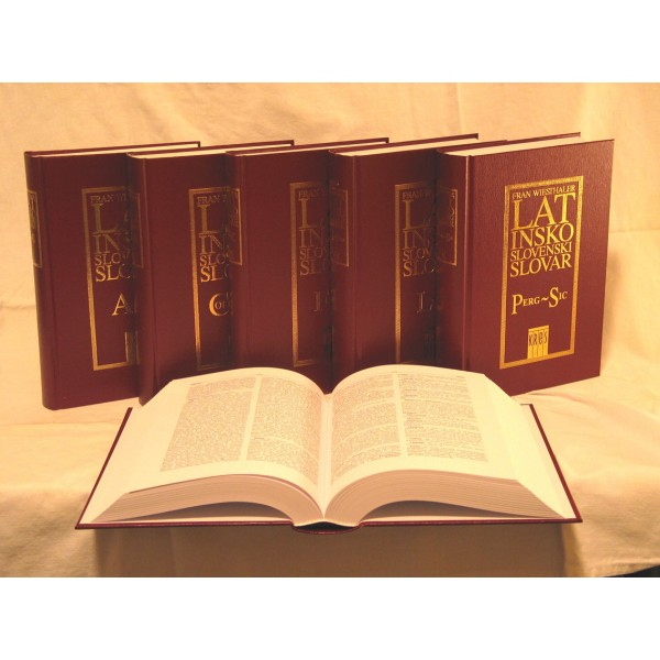 Latinsko slovenski slovar - Fran Wiesthaler - v šestih knjigah